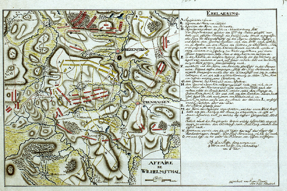 Schlacht bei Wilhelmsthal, 1762 Gegend um Wilhelmsthal und Grebenstein mit den Stellungen der alliierten und der französischen Truppen